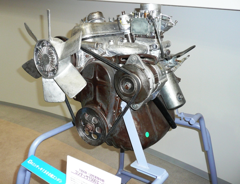 Hino Contessa 1500 engine.